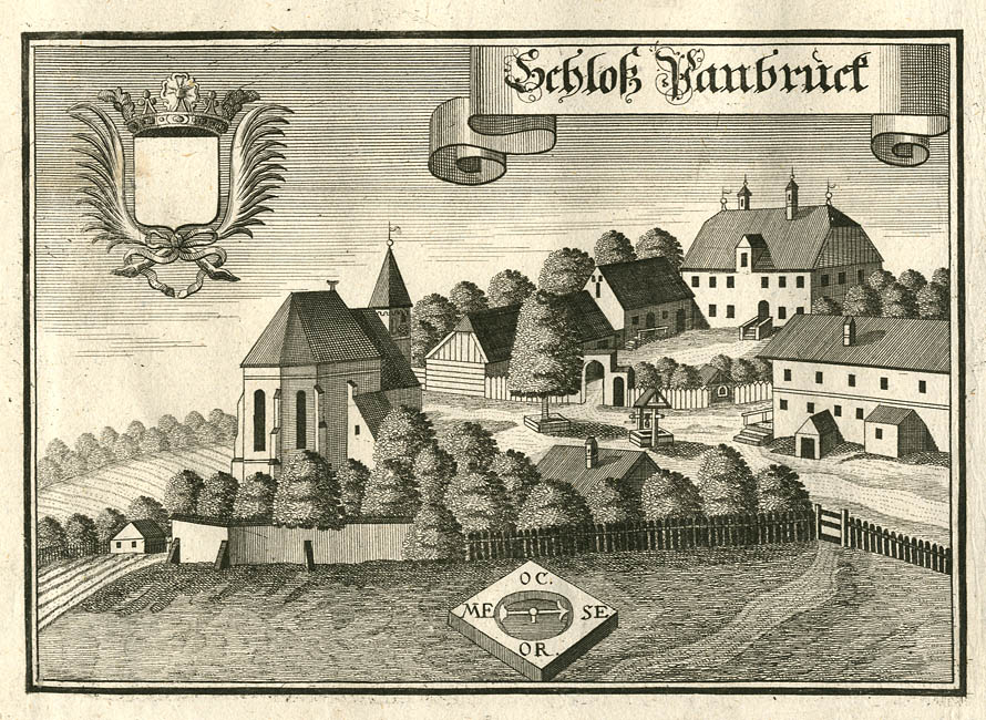 “Schloß Panbruck” (Bonbruck, Bodenkirchen), aus: Beschreibung des Churfürsten- u. Hertzogthumbs Ober- und Nidern Bayrn. Rentamt Landshut, 1723